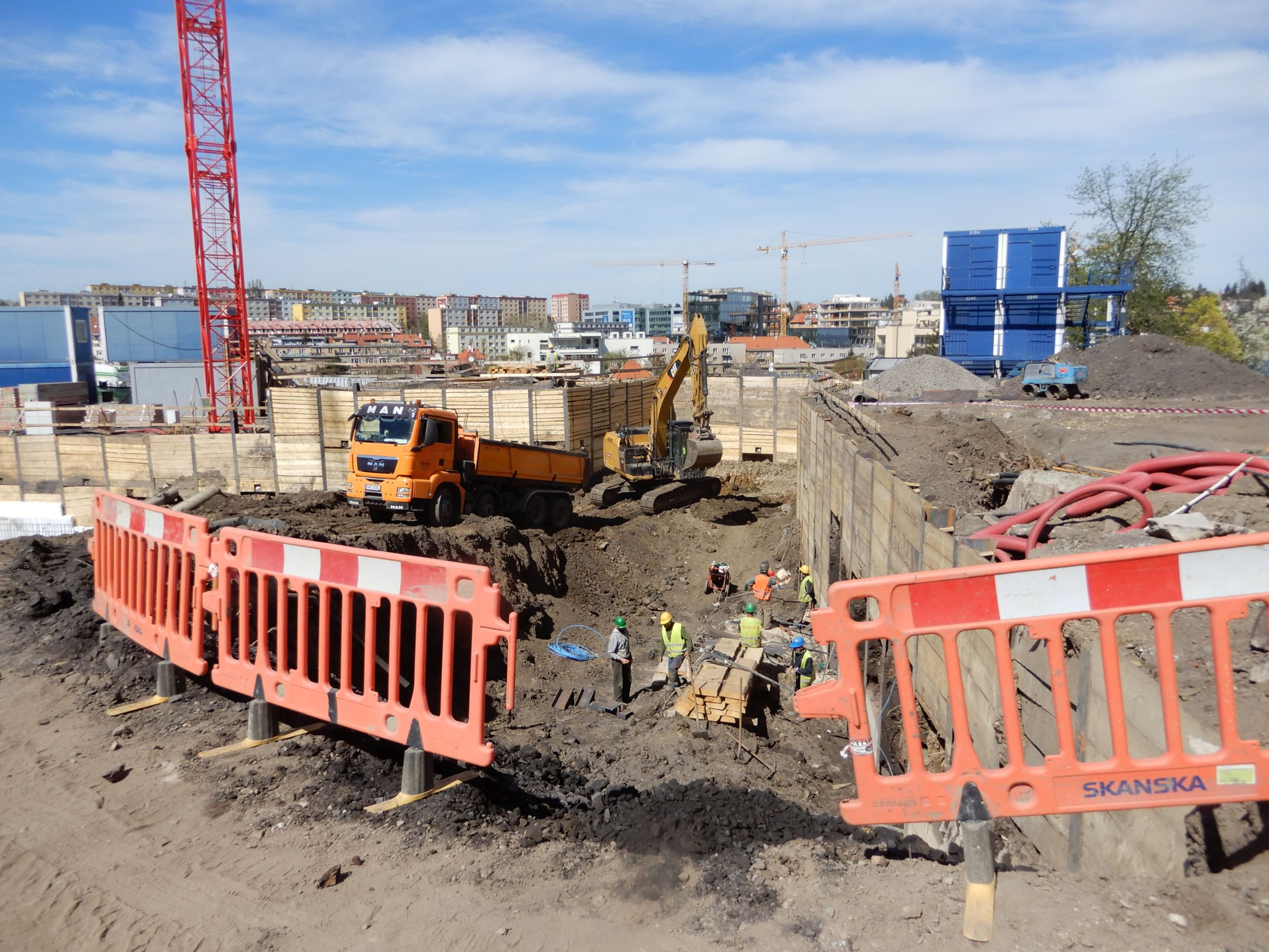 Cukrovarnická ulice, západní konec v roce 2020